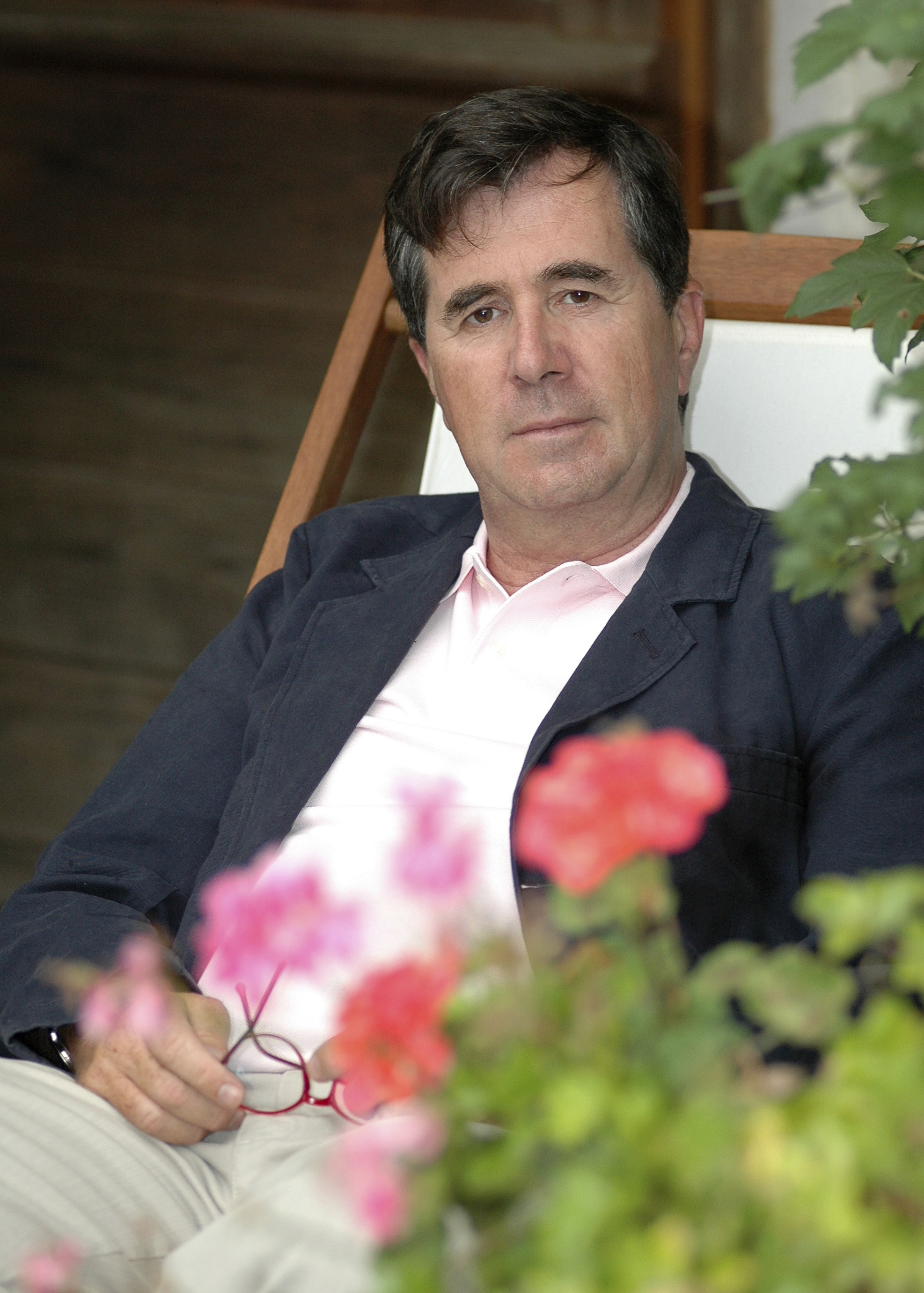 Le journaliste et écrivain français Bertrand Meyer-Stabley